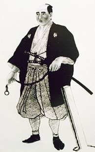 『間宮林蔵 肖像画』 江戸時代後期の冒険家・間宮林蔵 (1780 - 1844)の肖像画。 松岡映丘・画。